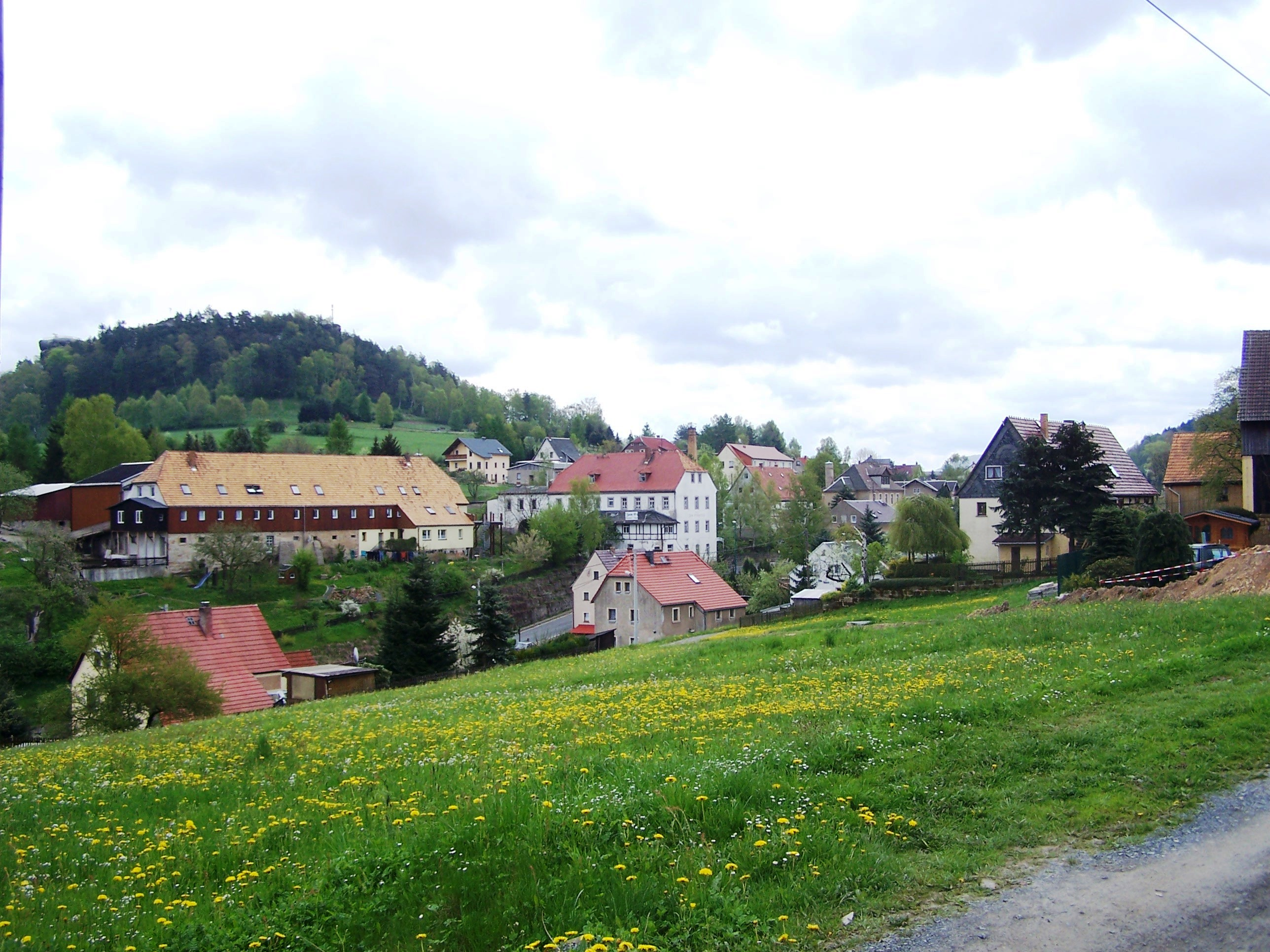 Ansicht von Schöna (Reinhardtsdorf-Schöna), im Hintergrund die Kaiserkrone